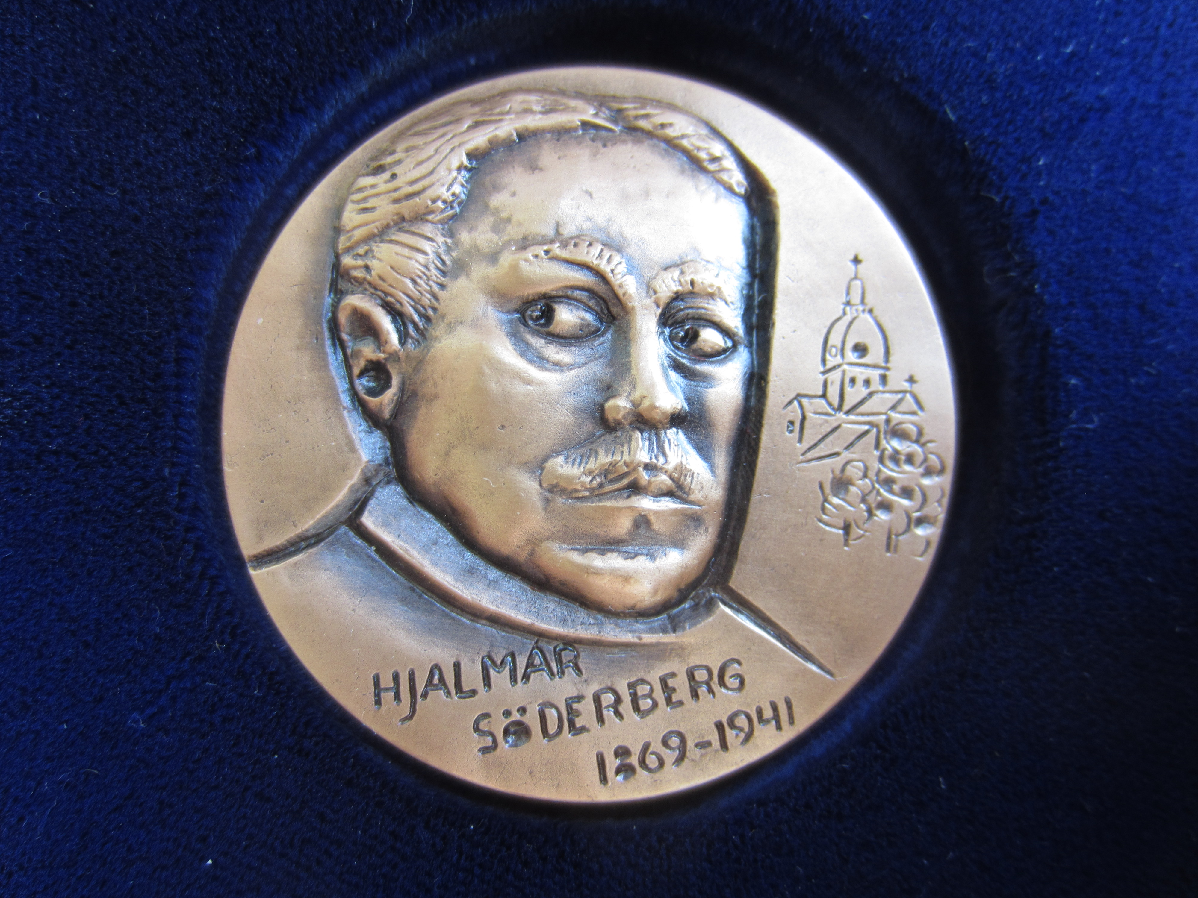 I medaljserien Stora Svenska Författare har Berndt Helleberg utformat förutom Hjalmar Söderberg även Bo Bergman, Vilhelm Ekelund, Sigfrid Siwertz och Hjalmar Bergman.